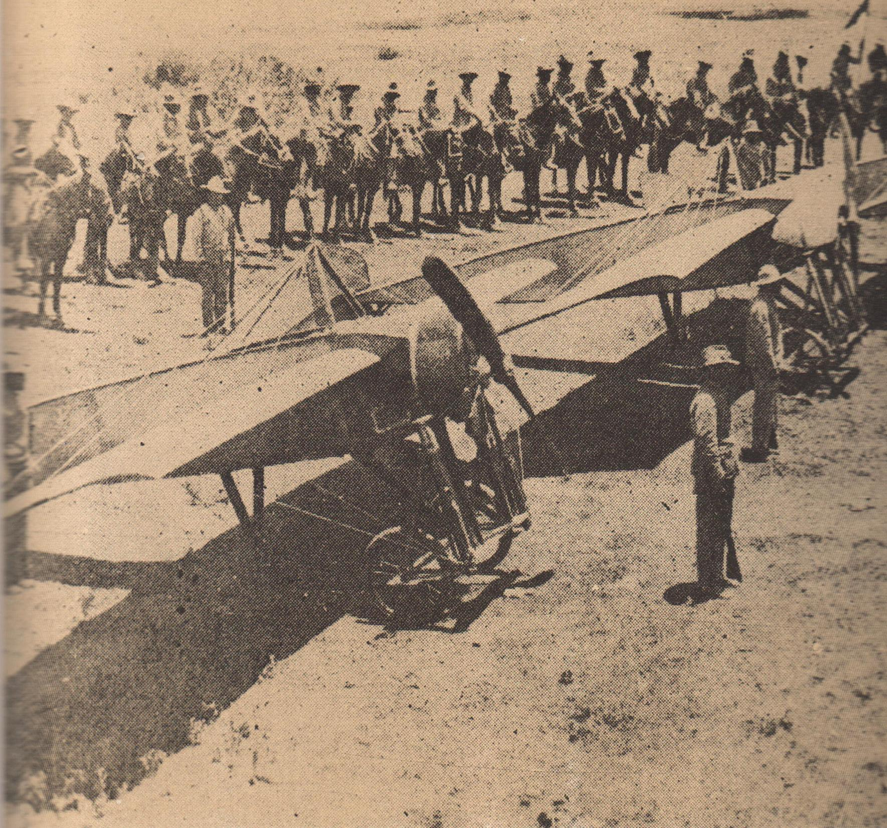 Aeroplano N°2 en la Batalla de El Ébano en San Luis Potosí